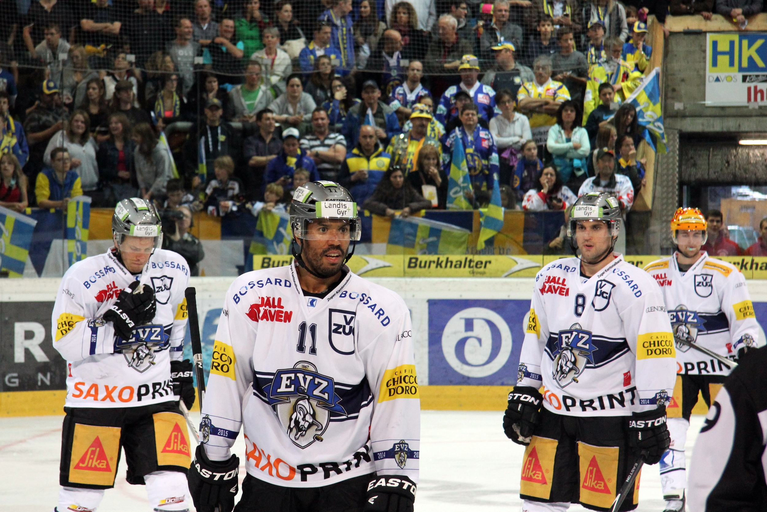 Björn Christen (Z 7), Robbie Earl (Z 11), Simon Lüthi (Z 8), Pierre-Marc Bouchard (Z 96, TS).